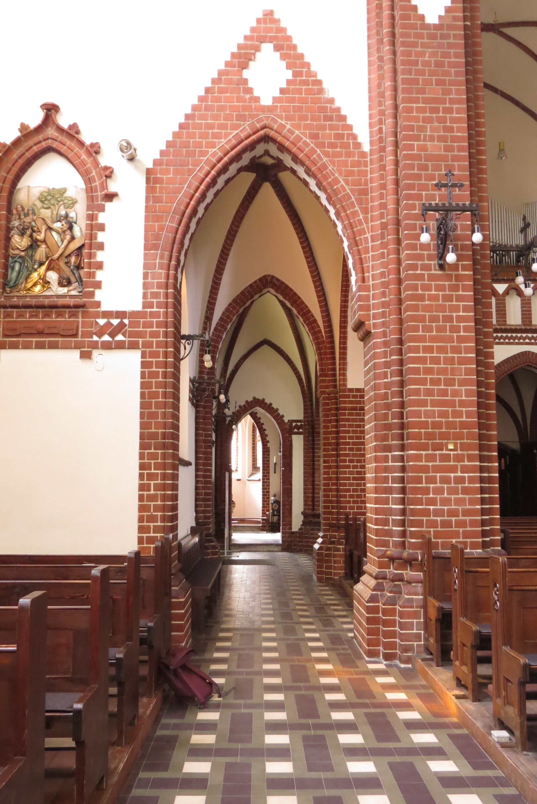 Kirche St. Georg, Berlin-Pankow, Seitenschiff